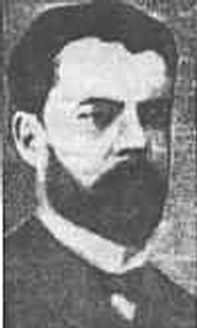 Ambrosio José Olmos